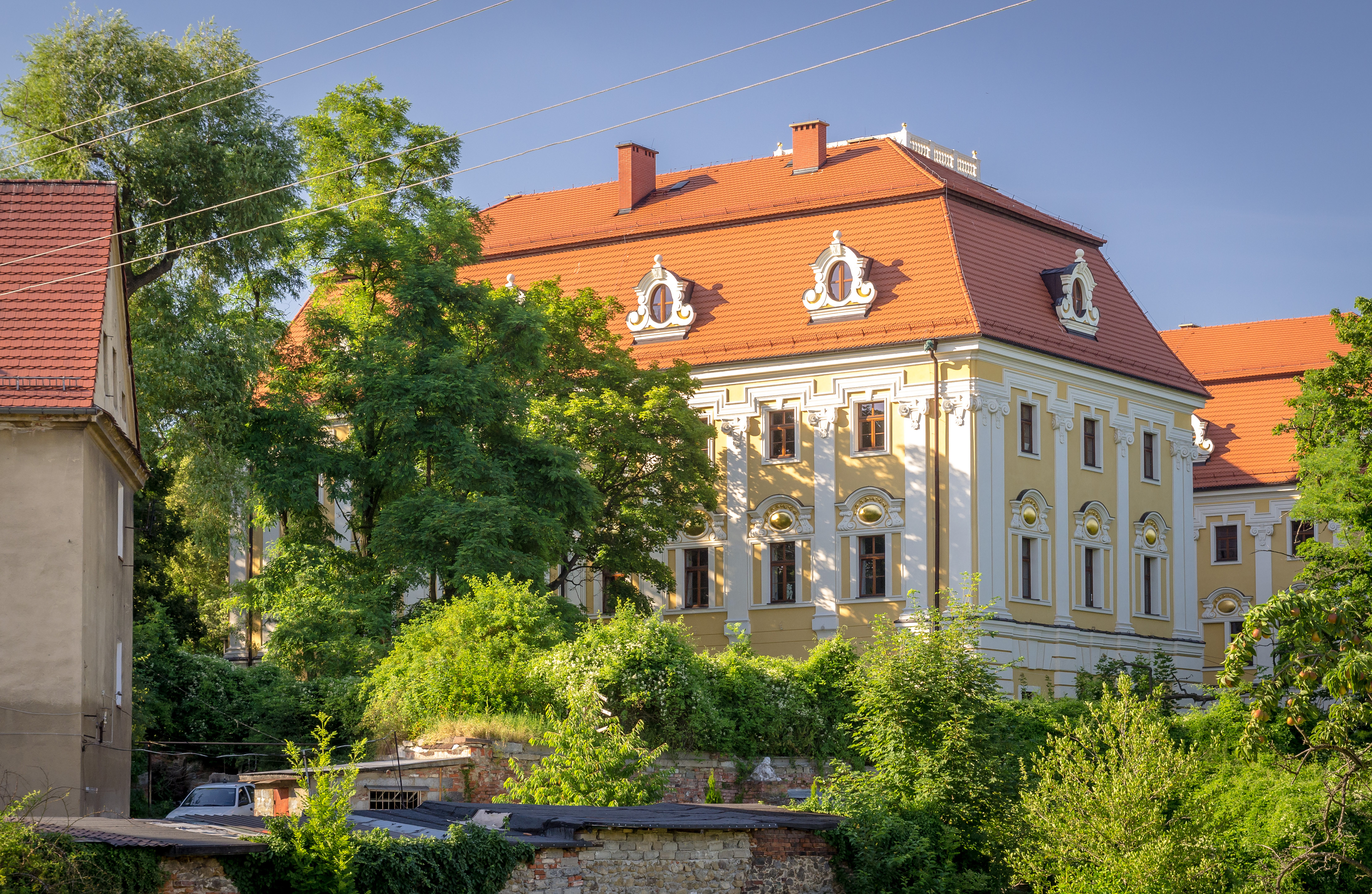 Pieszyce - pałac This photo of Lower Silesian Voivodeship was taken during Wikiexpedition 2013 set up by Wikimedia Polska Association. You can see all photographs in category Wikiekspedycja 2013.